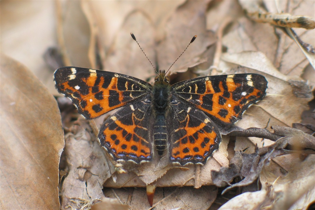 Landkärtchen (Araschnia levana), rote Variante